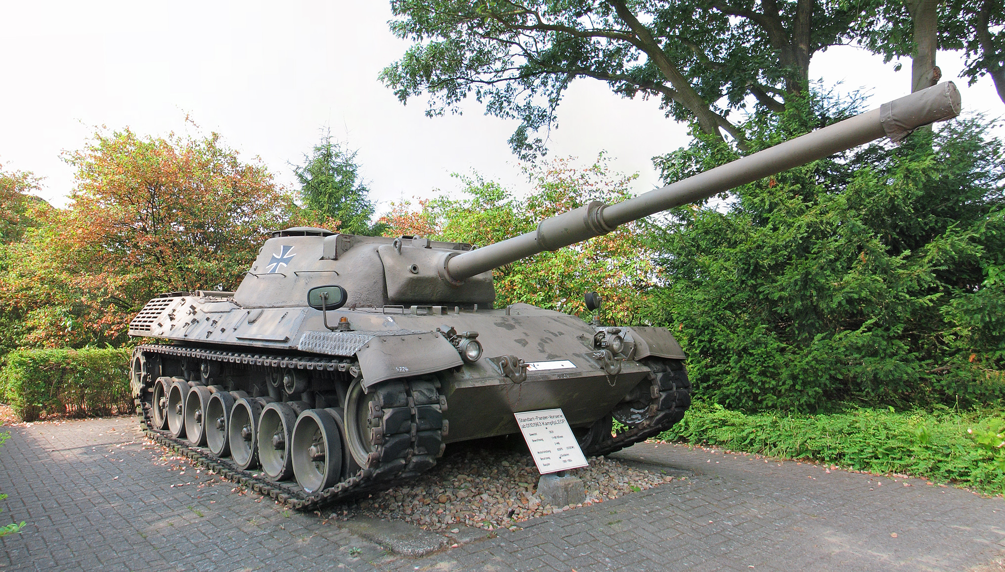 Dieses Bild zeigt einen Vorserienpanzer Leopard 1. Er befindet sich auf dem Gelände des Panzermuseums in Munster.